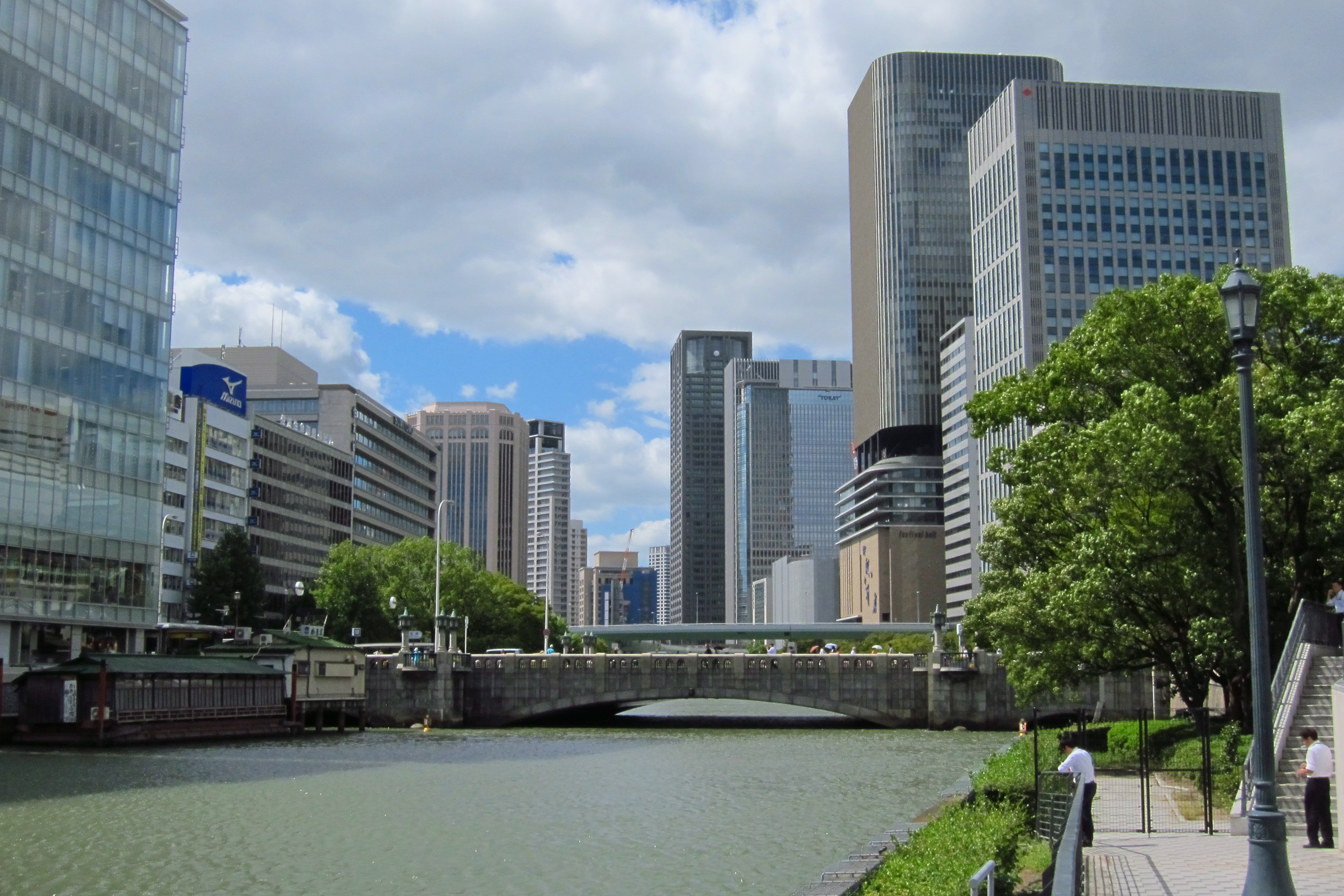 Nakanoshima (中之島), Osaka, Osaka prefecture, Japan